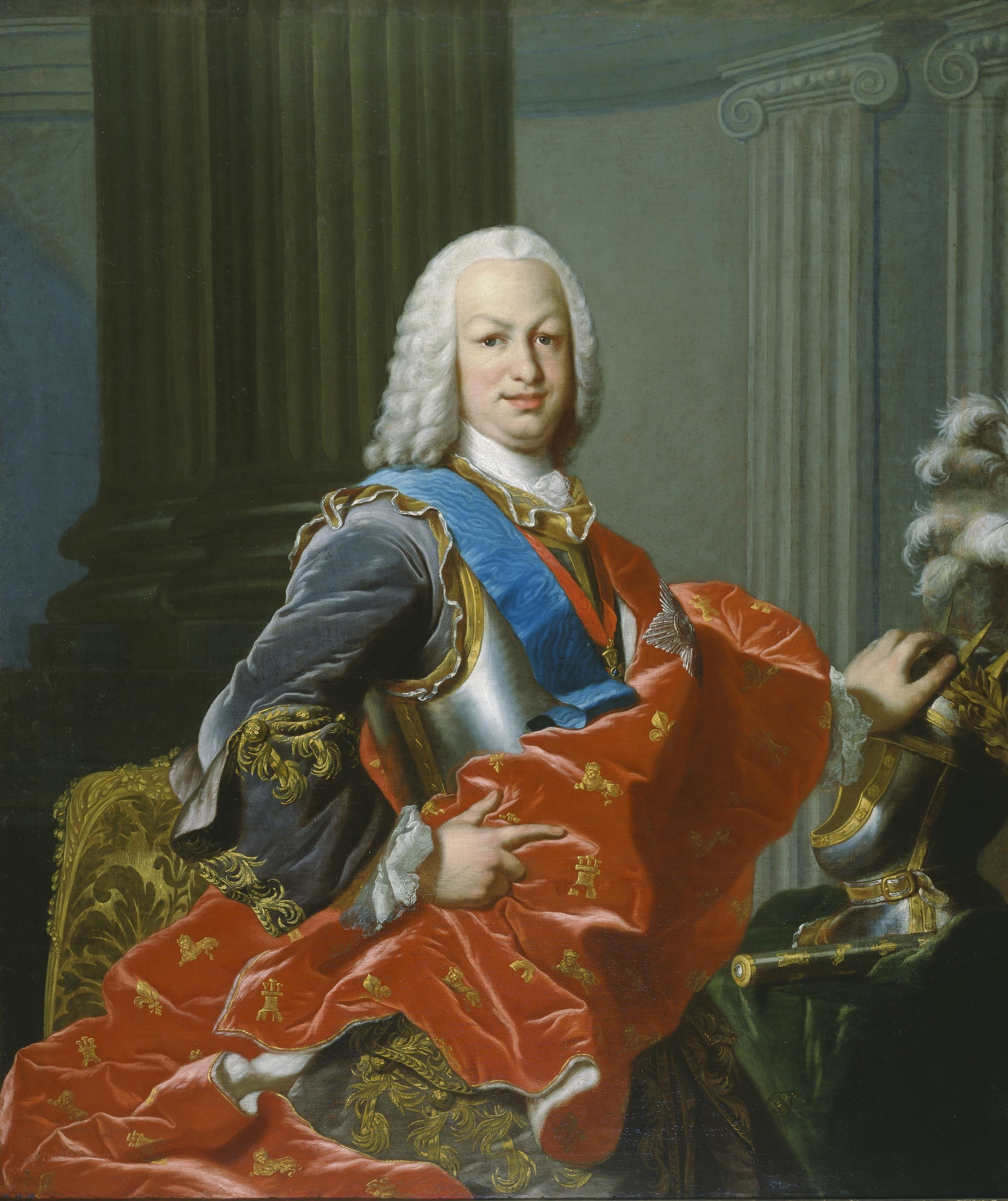 Retrato del rey Fernando VI de España (1713-1759), que fue hijo del rey Felipe V de España y de la reina María Luisa Gabriela de Saboya.